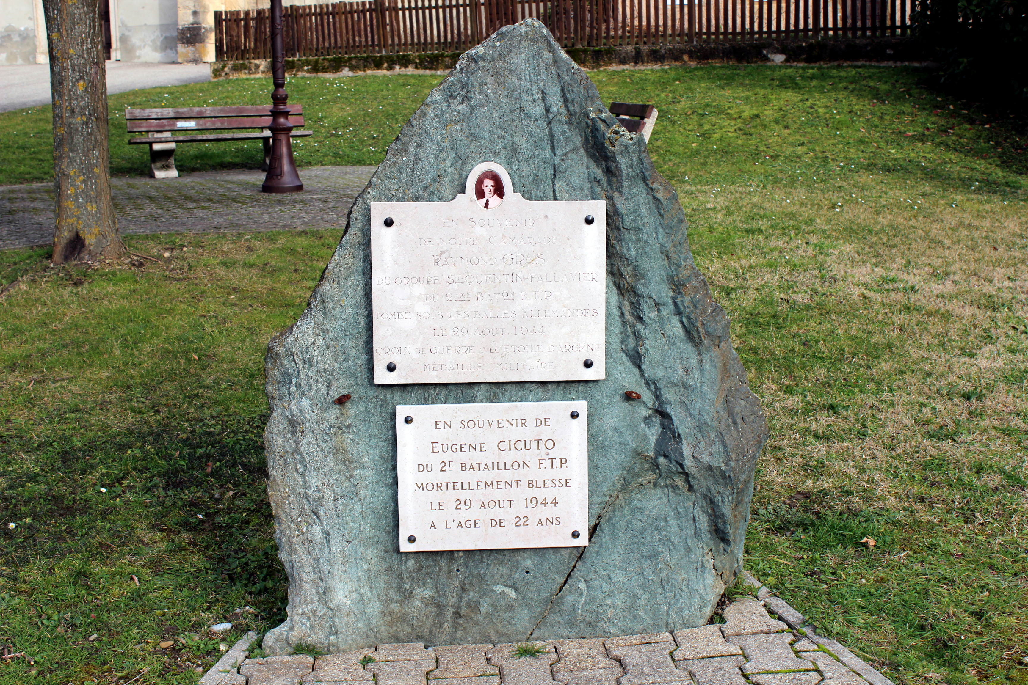 Plaque à l'effigie d'Eugène Cicuto à Bonnefamille.